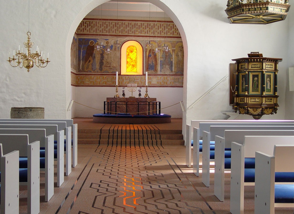 Kirche in Jelling, Innenraum